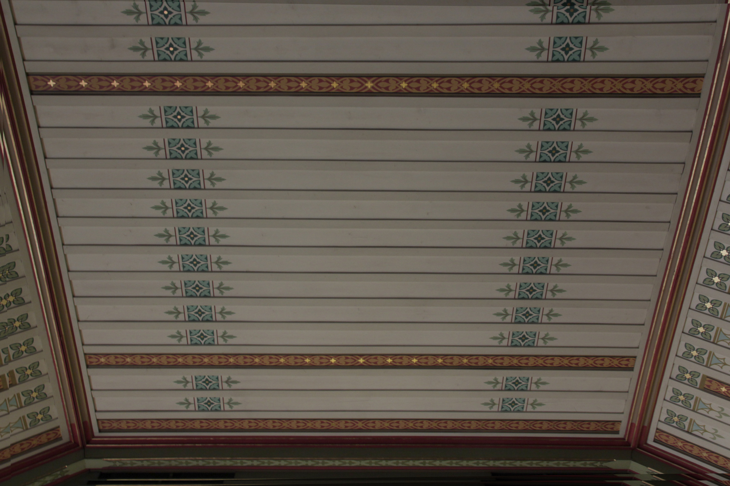 Römisch-katholische Kirche St. Peter und Paul (Zürich)